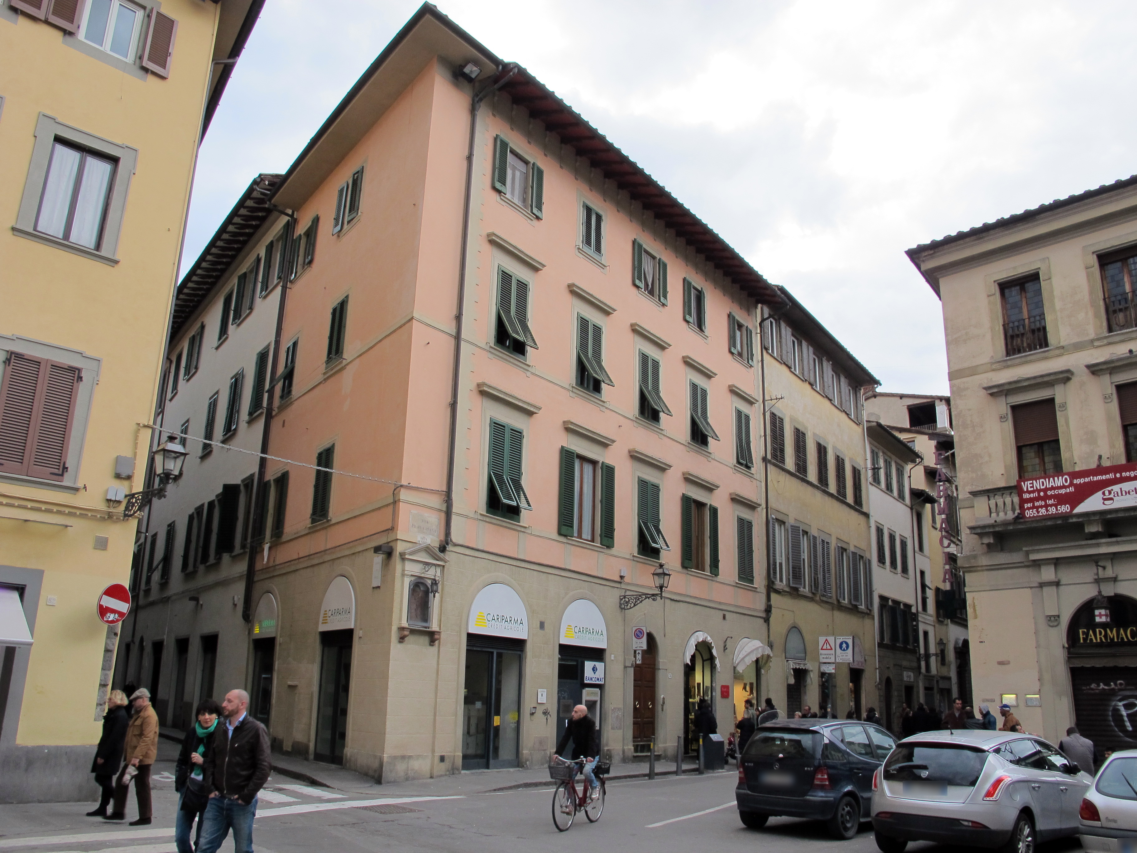 Via pietrapiana 38, casa con tabernacolo